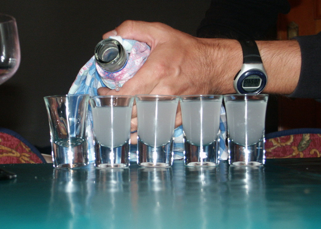 Ouzo wird gut gekühlt getrunken. Hier ist die durch den Louche-Effekt erzeugte Trübung sehr deutlich zu erkennen. Bei Zimmertemperatur und im reinen Zustand ist Ouzo klar.